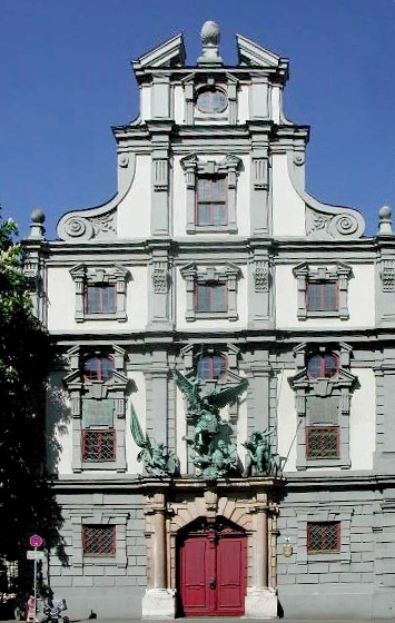 Augsburger Zeughaus vom Apothekergässchen gesehen